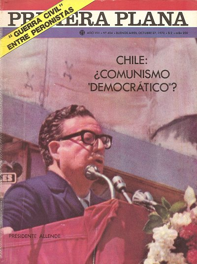 Salvador Allende Gossens (Valparaíso, 26 de junio de 1908 - Santiago, 11 de septiembre de 1973) 1970 revista